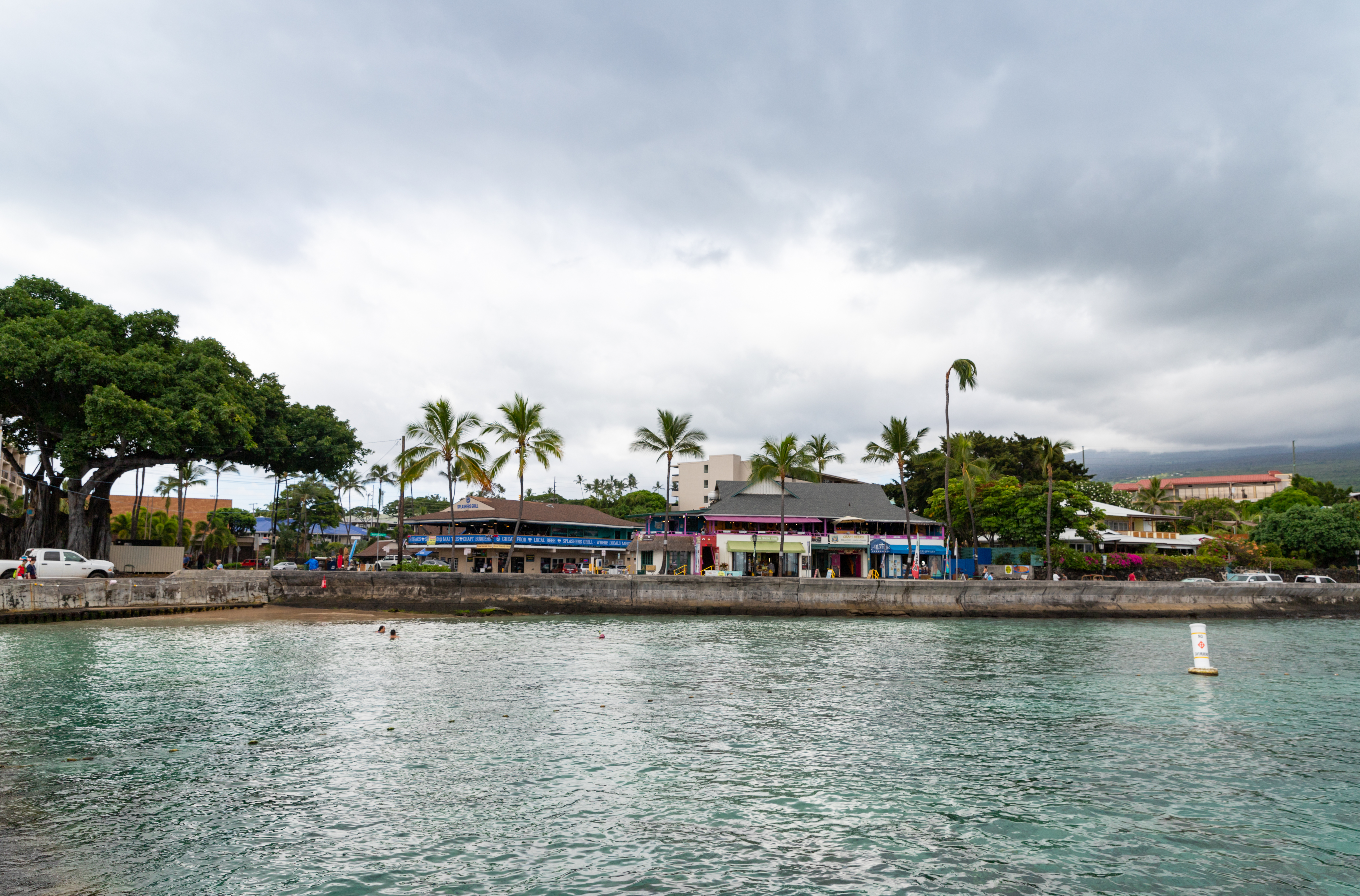 Iron man swim start Kailua Bay Kona Big island Hawaii